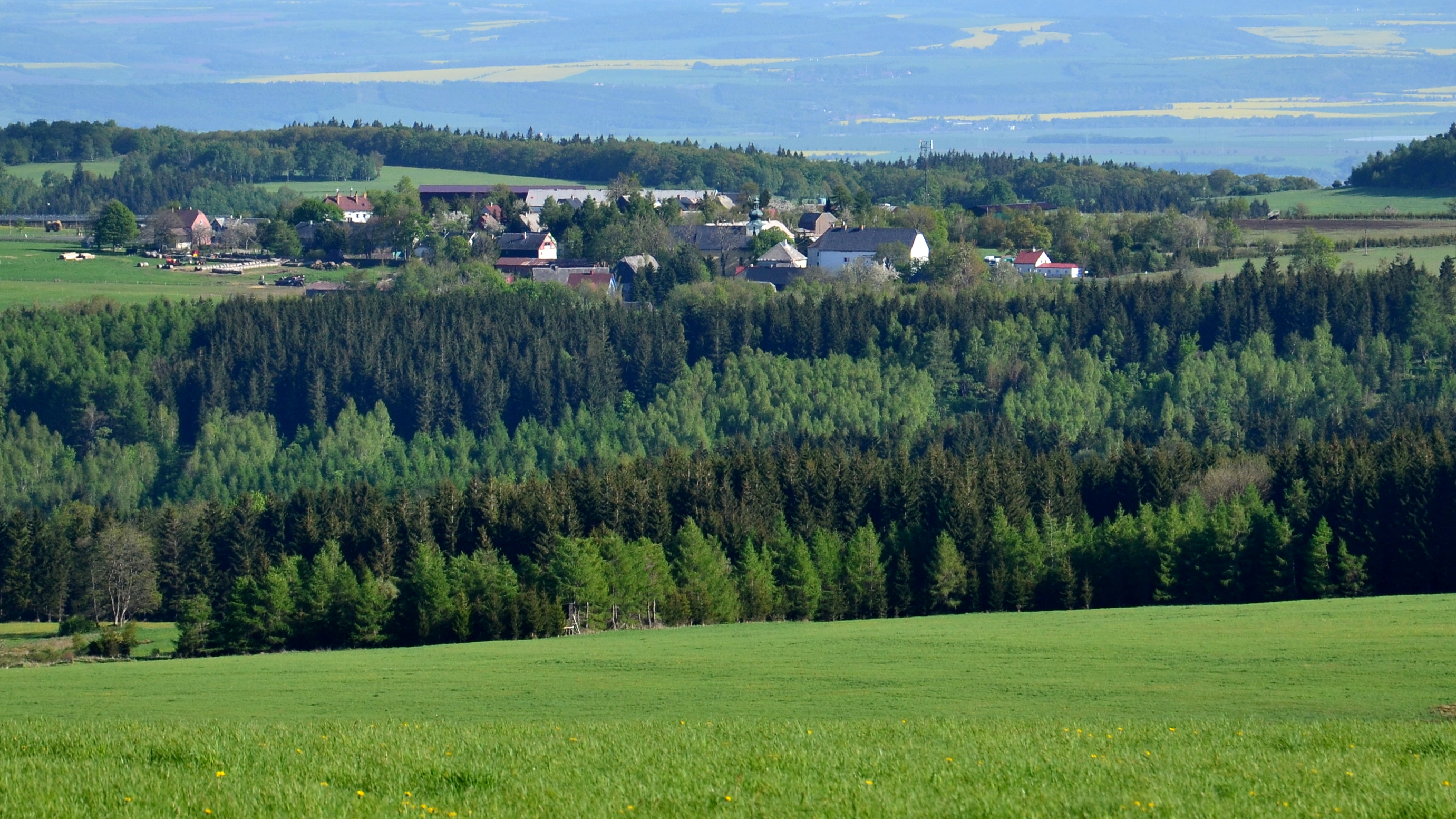 Křimov z Menhartického vrchu